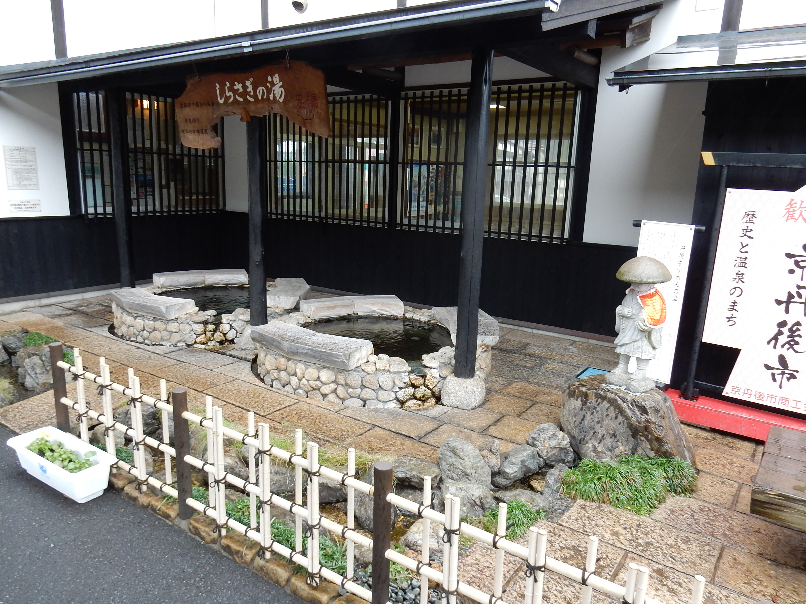 京都丹後鉄道夕日ヶ浦木津温泉駅ホームにある足湯